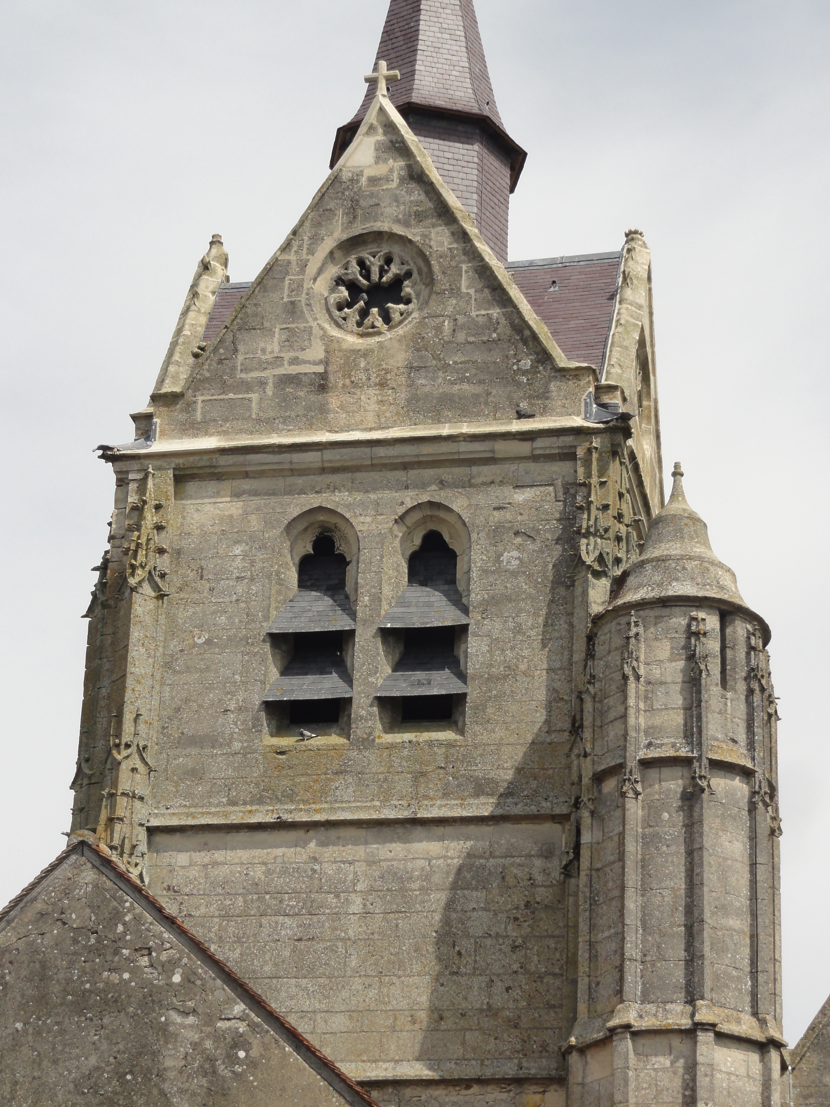 Clocher.